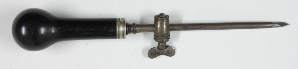 Gerader Metallstab mit lanzenförmiger Spitze aus silberfarbenen Metall, darüber offenes Metallröhrchen (aus anderem Metall), in einer Länge die, die Lanzenspitze frei läßt, mit feststellbarer Flügelschraube. Metallstab mit rundem Knaufgriff aus poliertem Ebenholz.